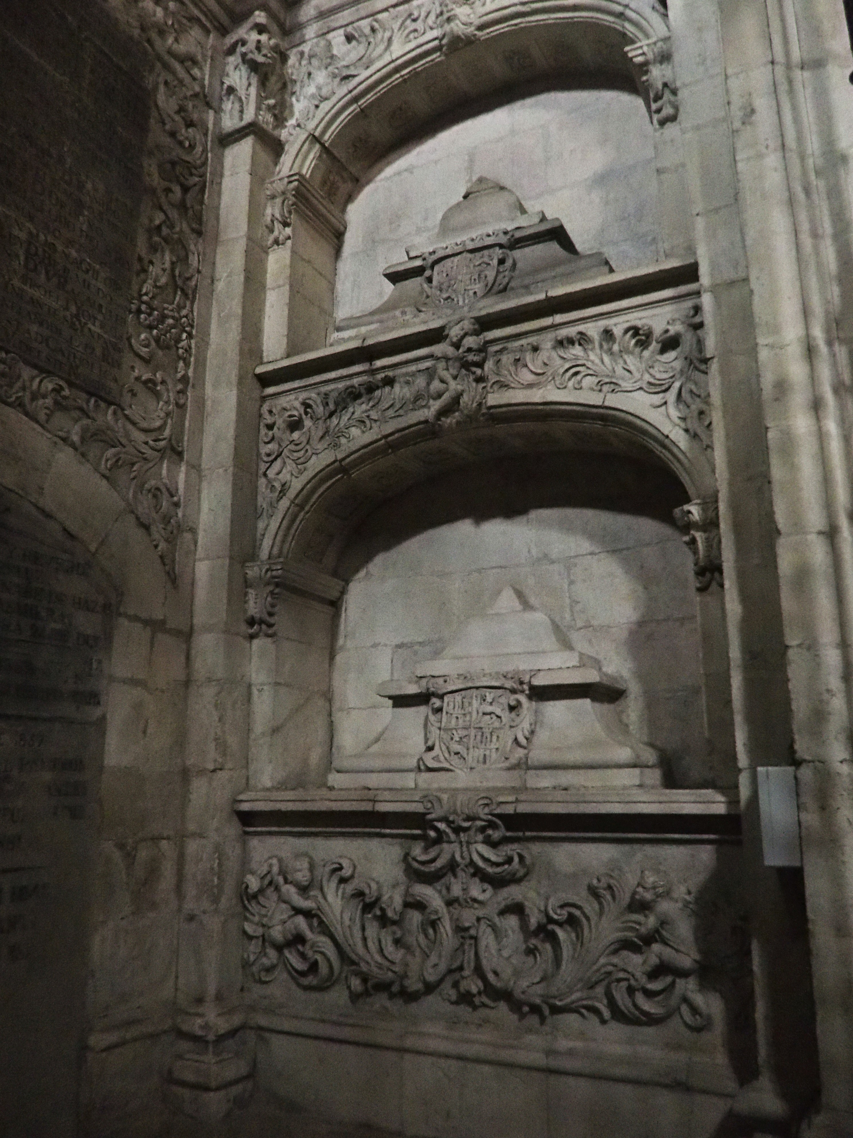 Panteó dels reis d'Astúries, a la Capilla del Rey Casto de la catedral d'Oviedo, construït al s. XVIII